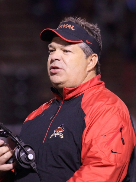 Glen Constantin lors d'un match au PEPS de l'Université Laval